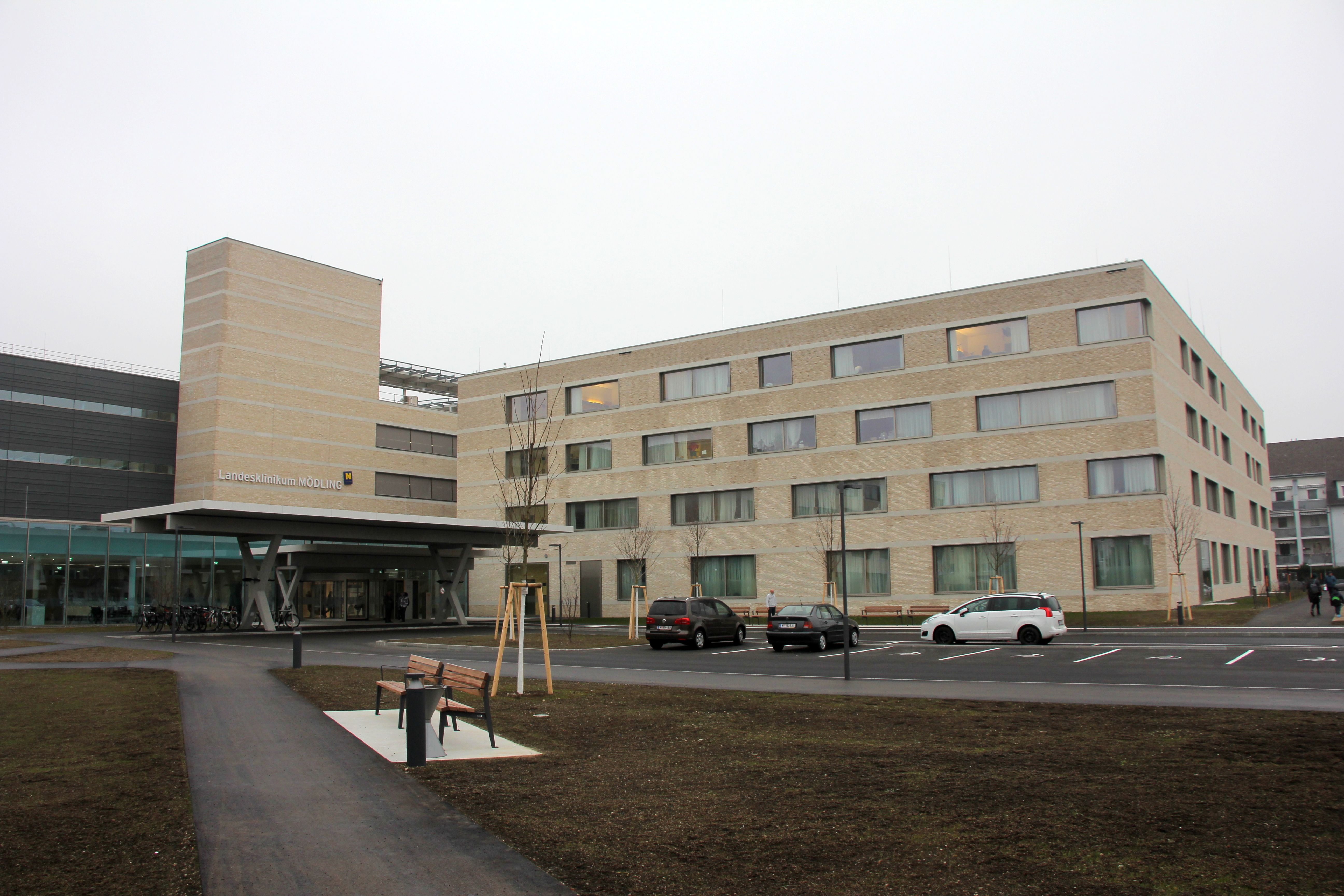 Krankenhaus Mödling in der Sr. Restitutagasse